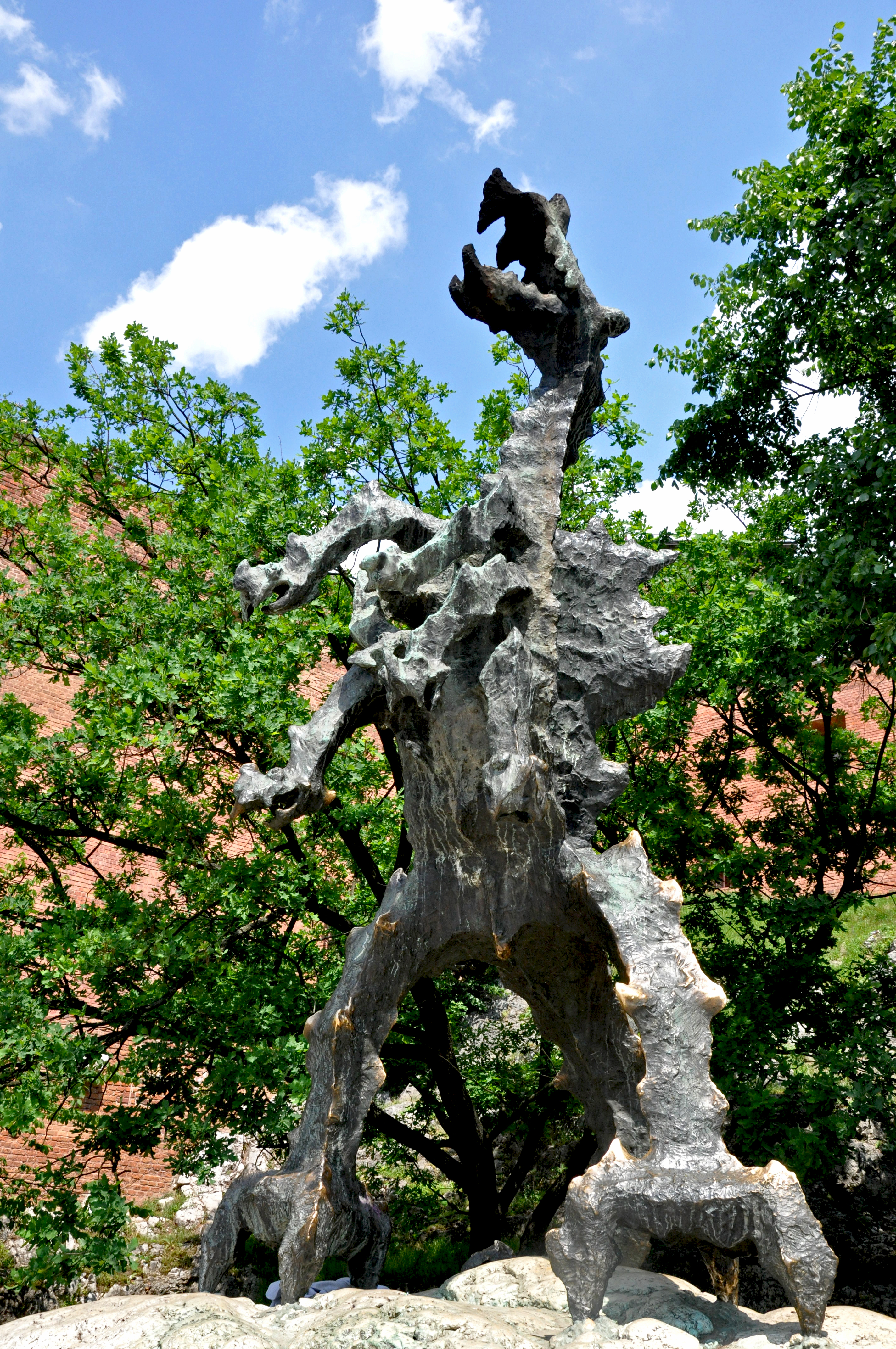 zdjęcie smoka wawelskiego (na wzgórzu wawelskim w Krakowie) English | Polski | +/−